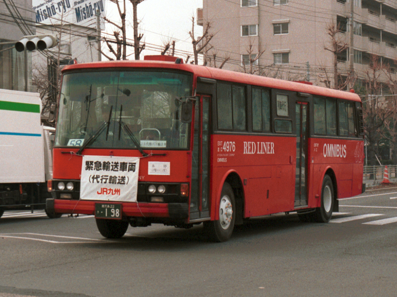 ＪＲ九州バス 鹿児島営業所 534-4976 御影付近 1995-2-4撮影